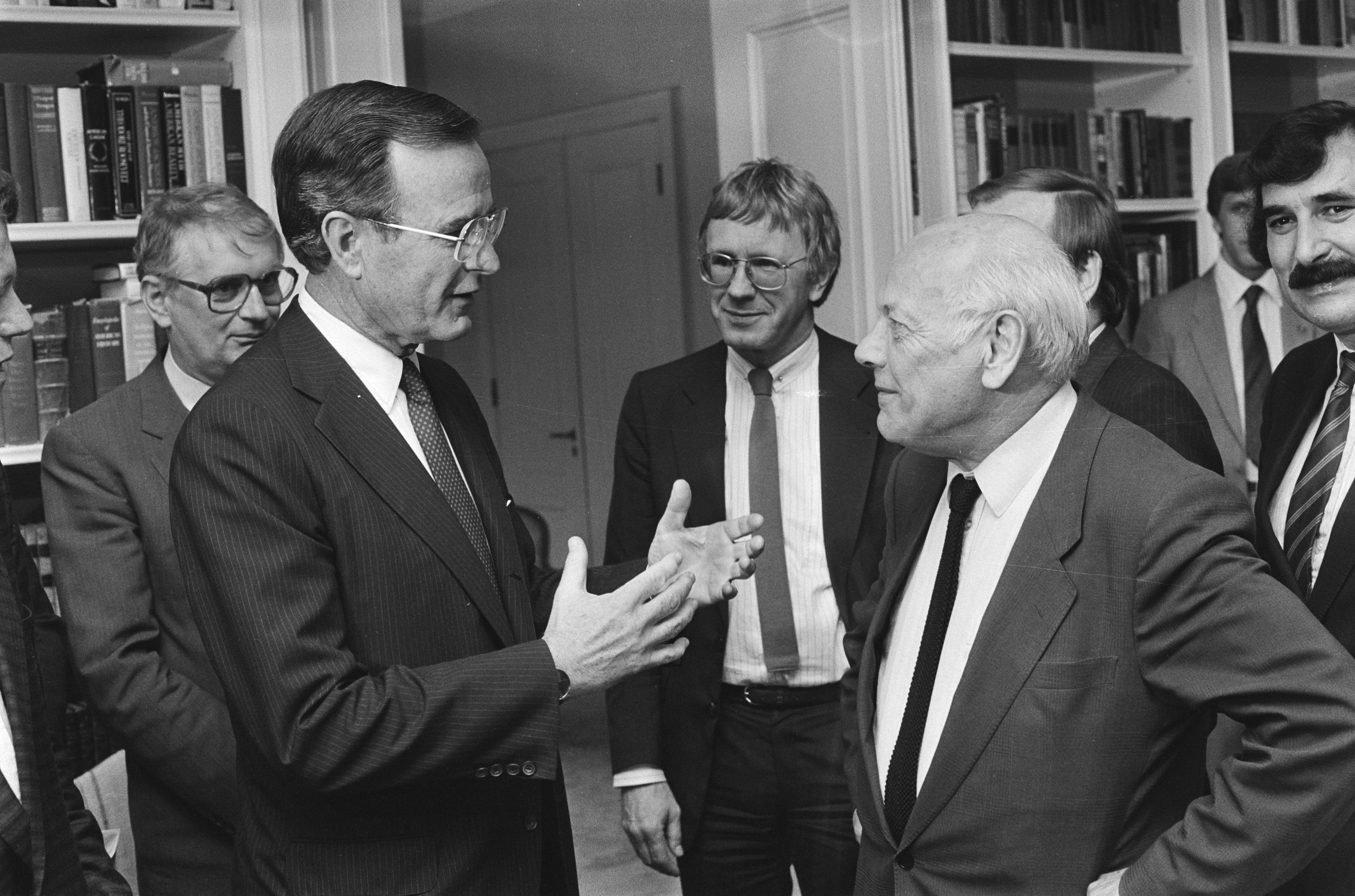 Collectie / Archief : Fotocollectie Anefo Reportage / Serie : [ onbekend ] Beschrijving : Bezoek vice-president George Bush van de VS; gesprek met de oppositie Bush in gesprek met Den Uyl , Stemerdink (PvdA) (m), Meyer, (l) Van de Berg (PvdA) (r) / Datum : 26 juni 1985 Trefwoorden : GESPREKKEN, Vice-presidenten, bezoeken Persoonsnaam : Bush George, Stemerdink, Bram, Uyl, Joop den Fotograaf : Bogaerts, Rob / Anefo Auteursrechthebbende : Nationaal Archief Materiaalsoort : Negatief (zwart/wit) Nummer archiefinventaris : bekijk toegang 2.24.01.05 Bestanddeelnummer : 933-3644